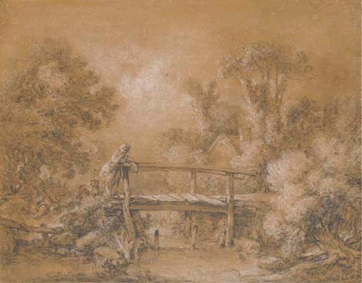 Papier brun, craie noire et blanche 27.4 cm x 34.9 cm Vers 1760 Collection privée